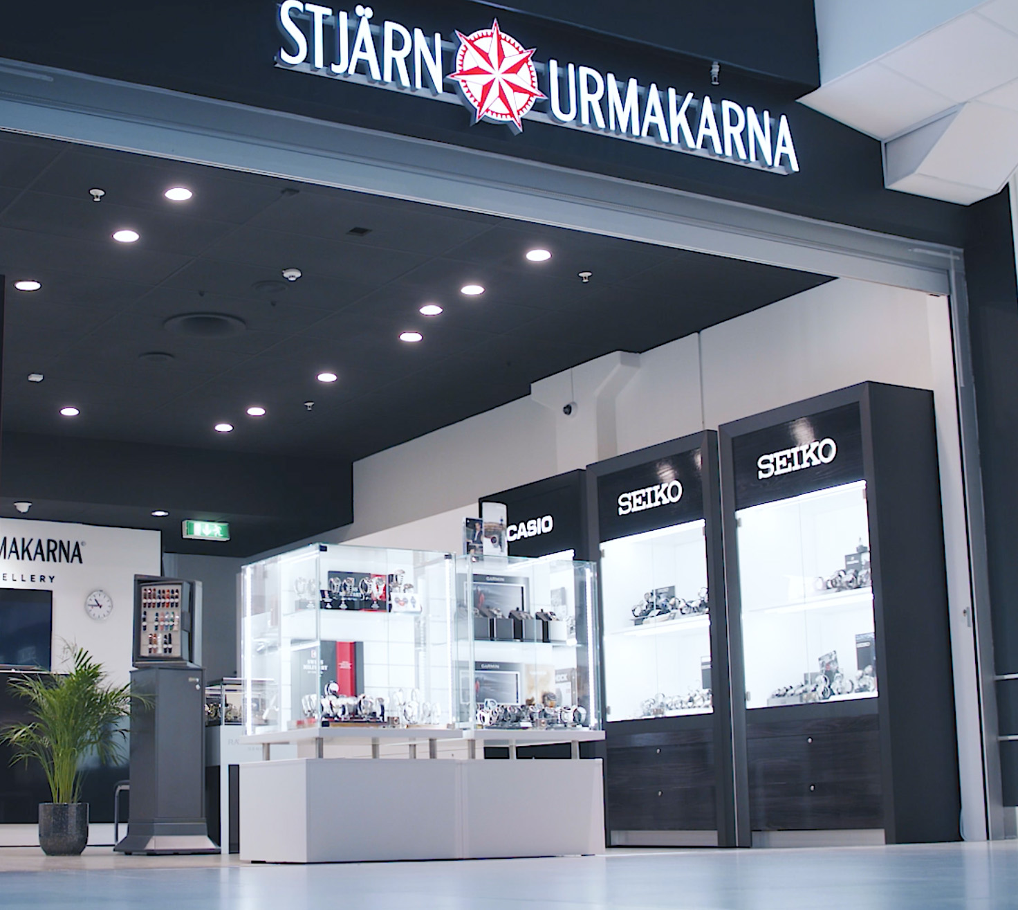 Butik - Stjärnurmakarna